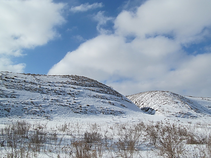 Ваўкавыск. Замчышча і гарадзішча